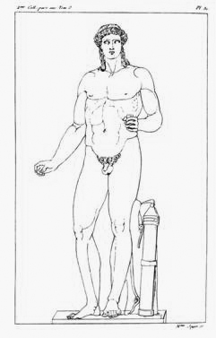 Kasseler Apollon